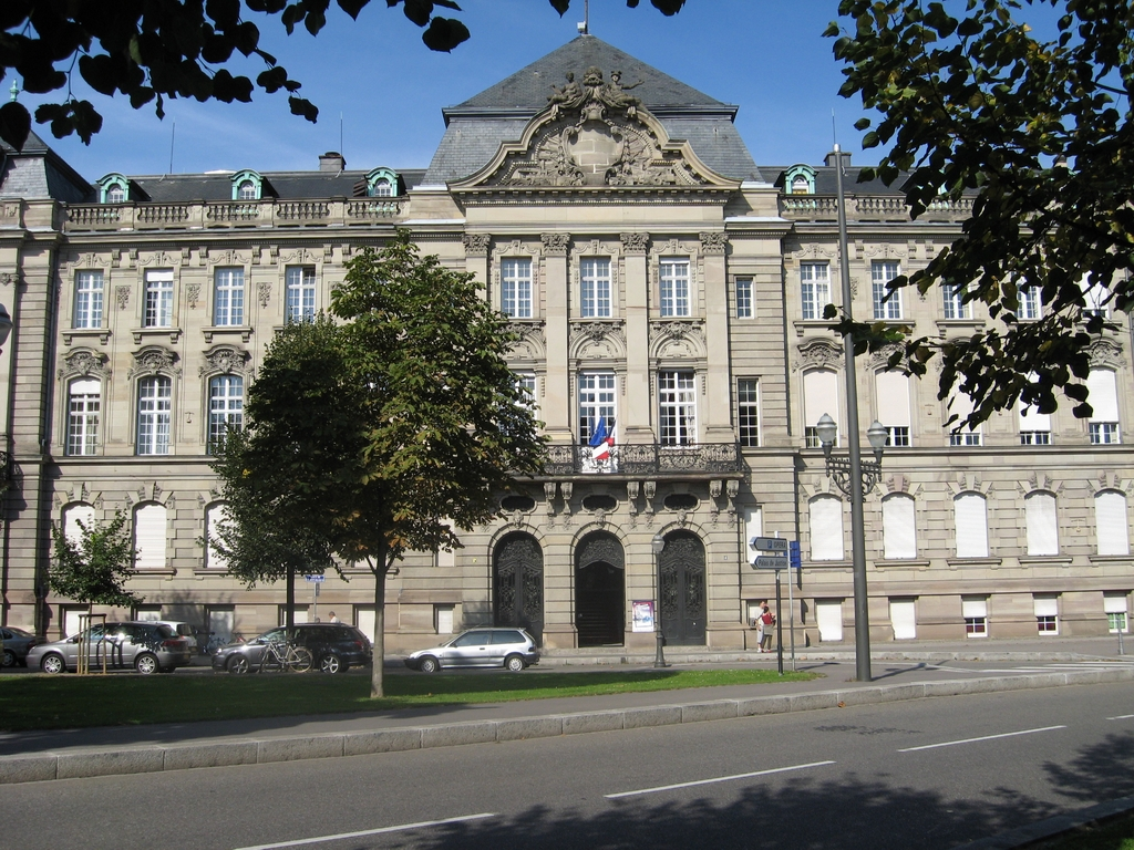 L'Hôtel des impôts de Strasbourg - spacieux, mais pas accueillant...